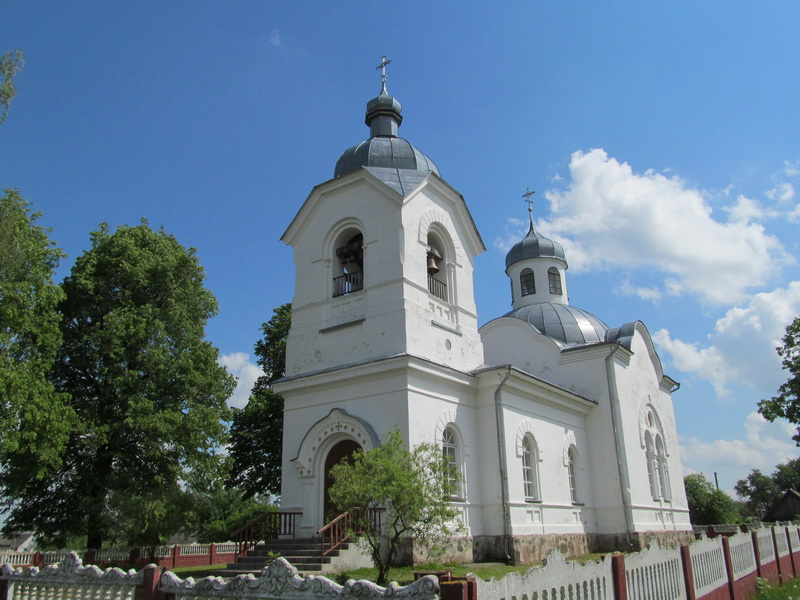 Люшнева. Успенская царква